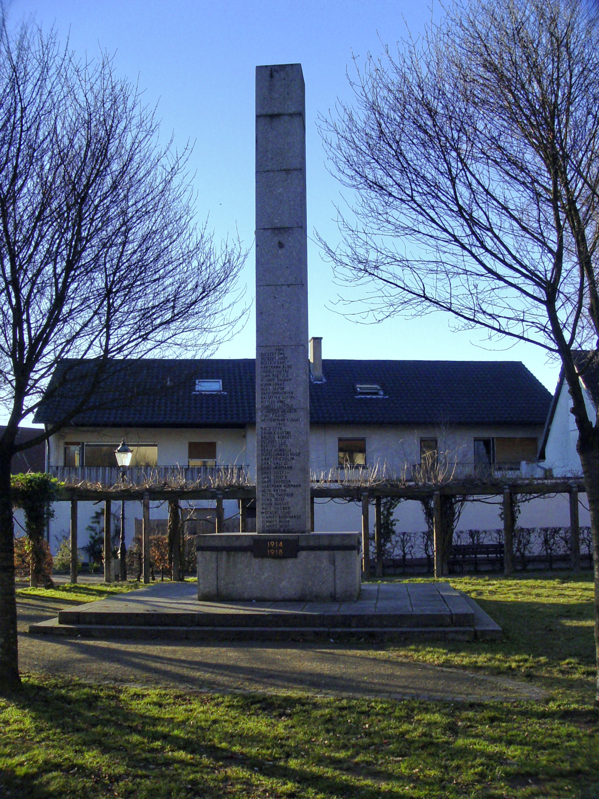 Das Denkmal der gefallenen Soldaten im Weltkrieg I/II in Bietigheim. Das Denkmal steht direkt vor der katholischen Kirche.